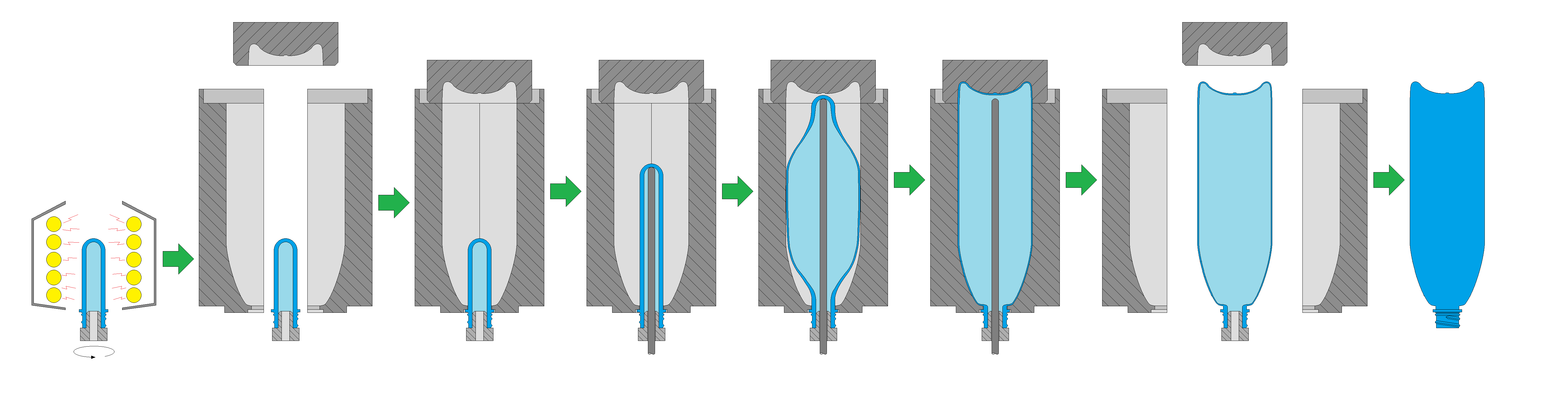 Streckblasen einer Flasche